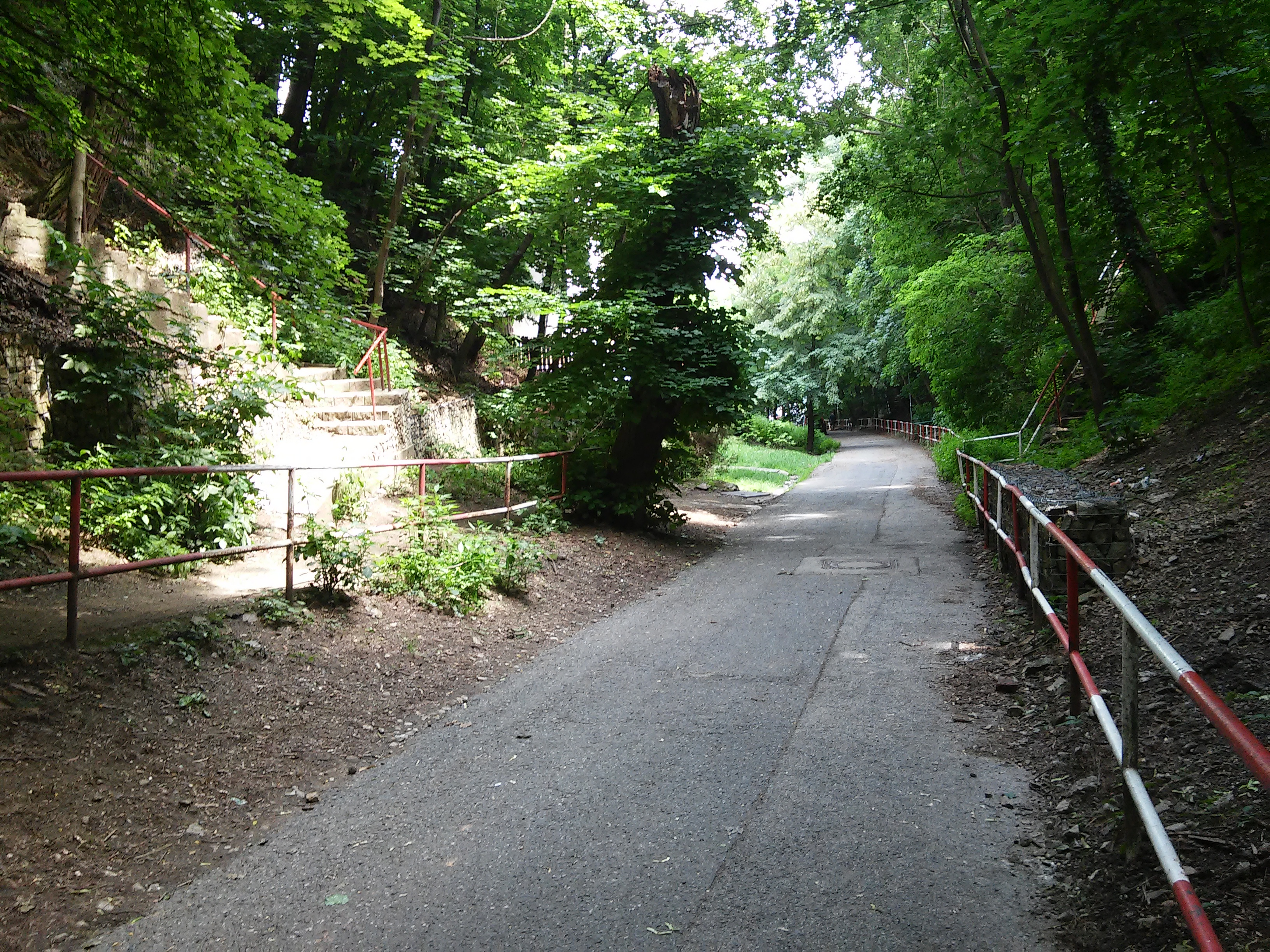 Hlboká cesta, Staré Mesto, Bratislava